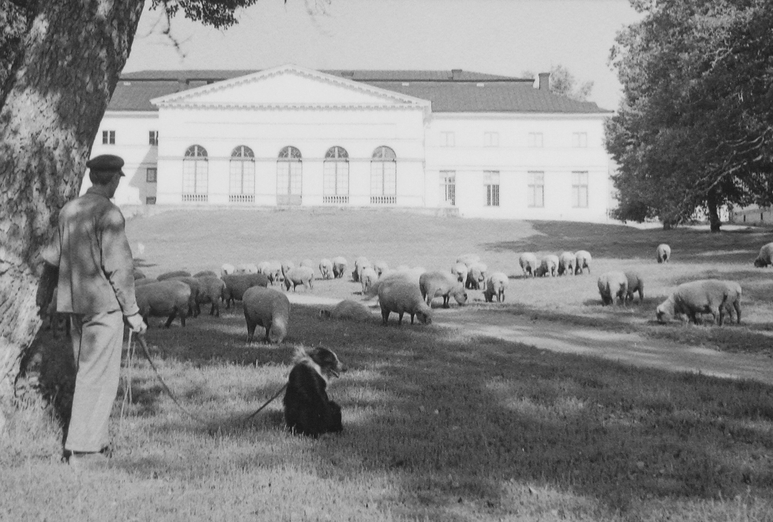 Drottningholms slottspark fårbete, före 1950